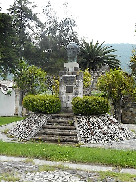 Monumento al Dr. Manuel Hernandez Hernandez en San Miguel Tixa, Oaxaca, Mexico.